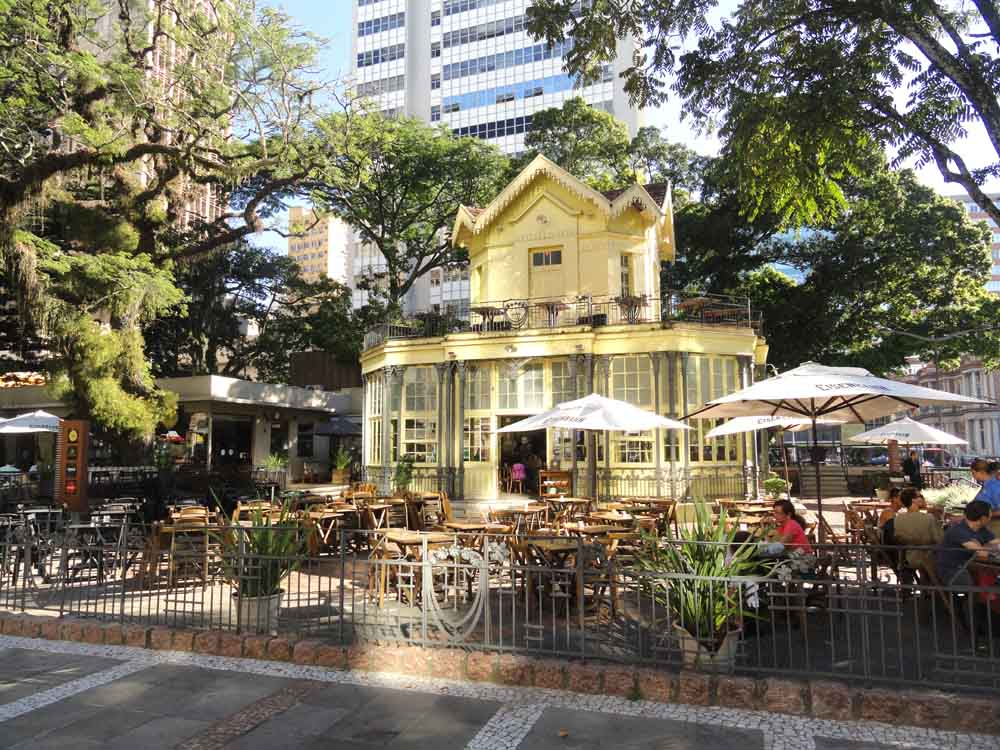 Chalé da Praça XV, tradicional bar e restaurante da cidade de Porto Alegre, Brasil.